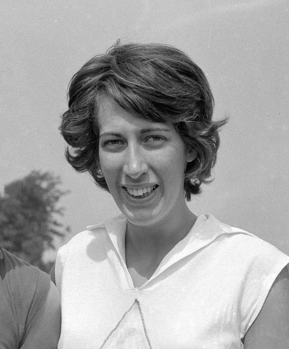 Kampioenschappen atletiek te Apeldoorn, Joke Bijleveld